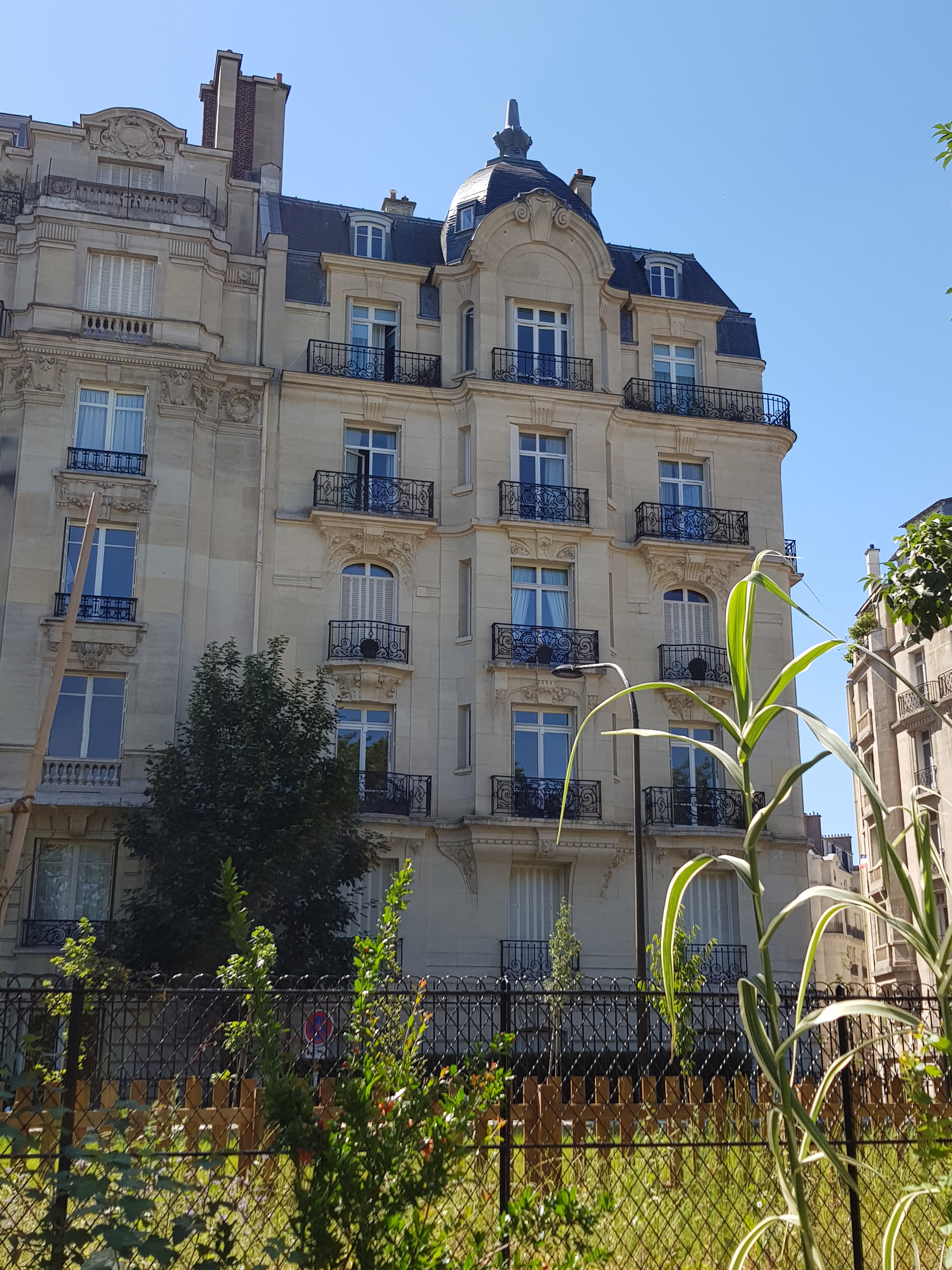 23, boulevard de Beauséjour, Paris 16e.